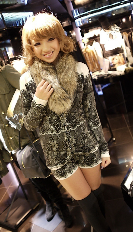 Gyaru